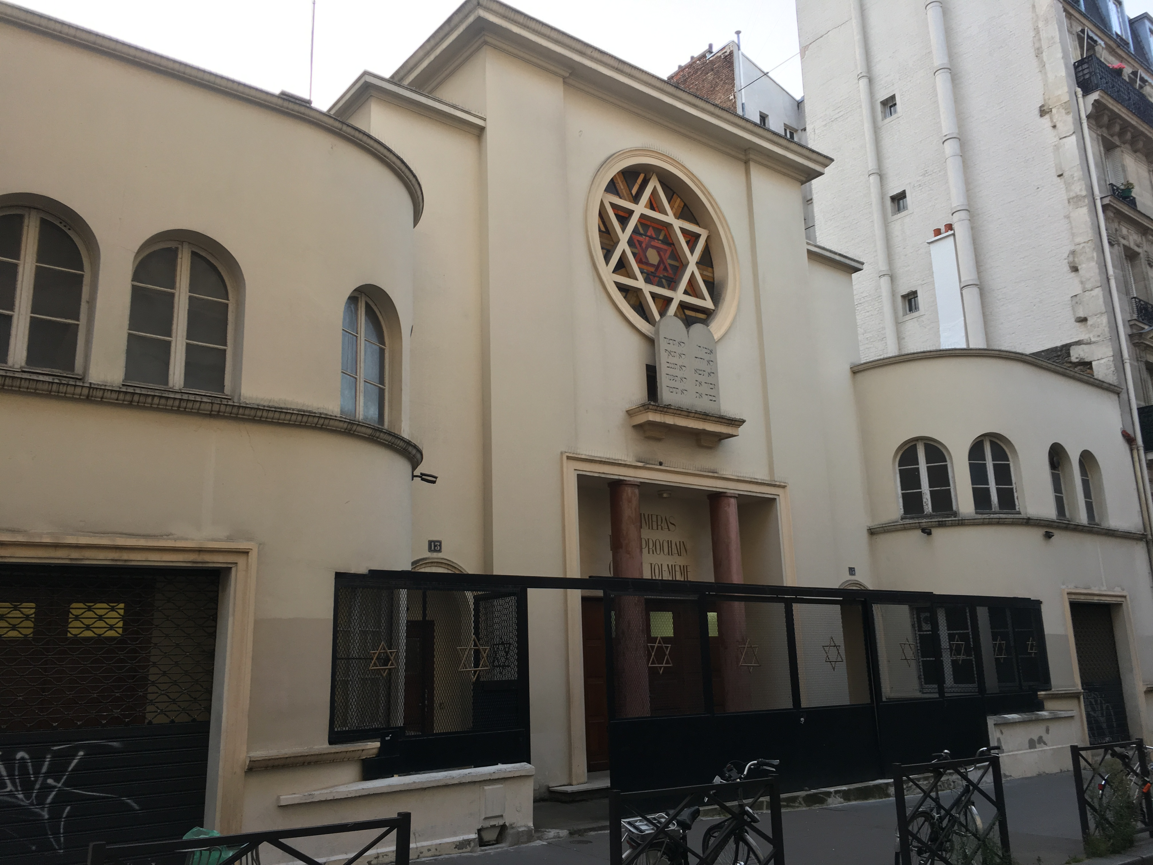 Vue de la façade.